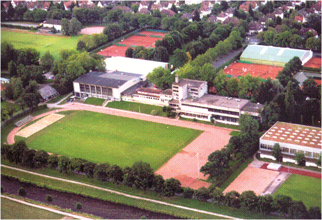 FT-Sportpark, Luftaufnahme